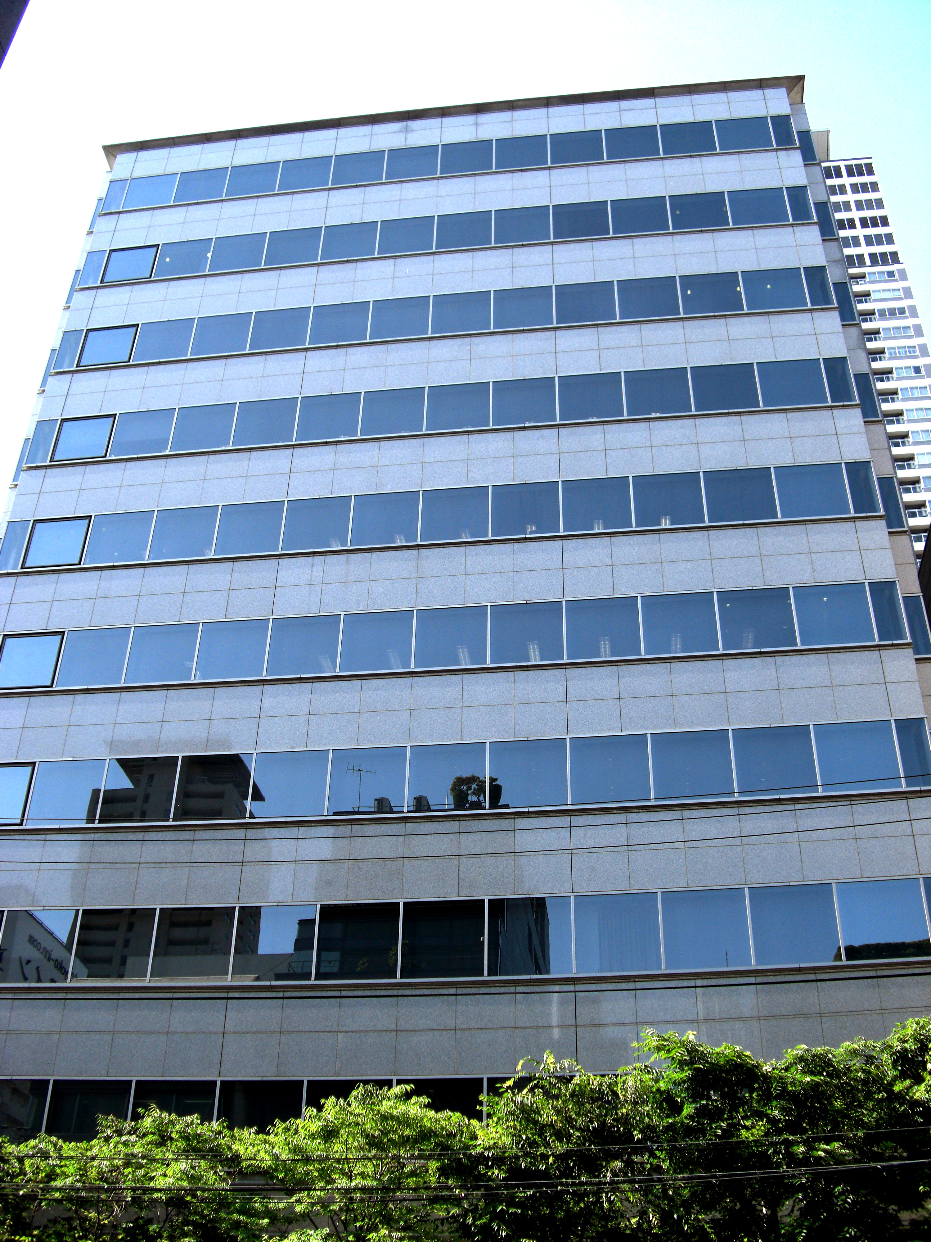 Shionogi & Company, Limited ,Doshomachi Chuo-ku Osaka-City Osaka Japan.